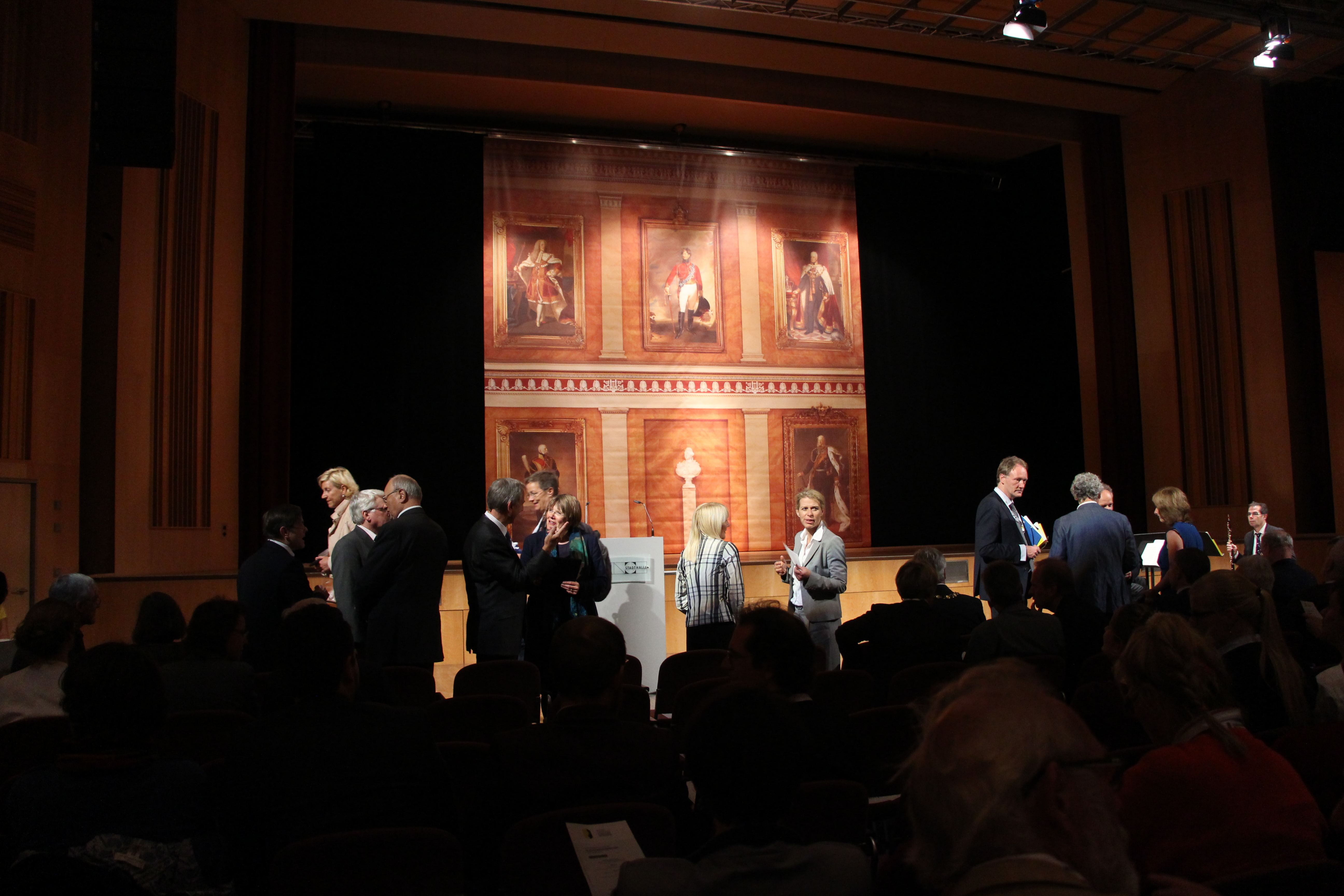 Historikertag 2014 in Göttingen.